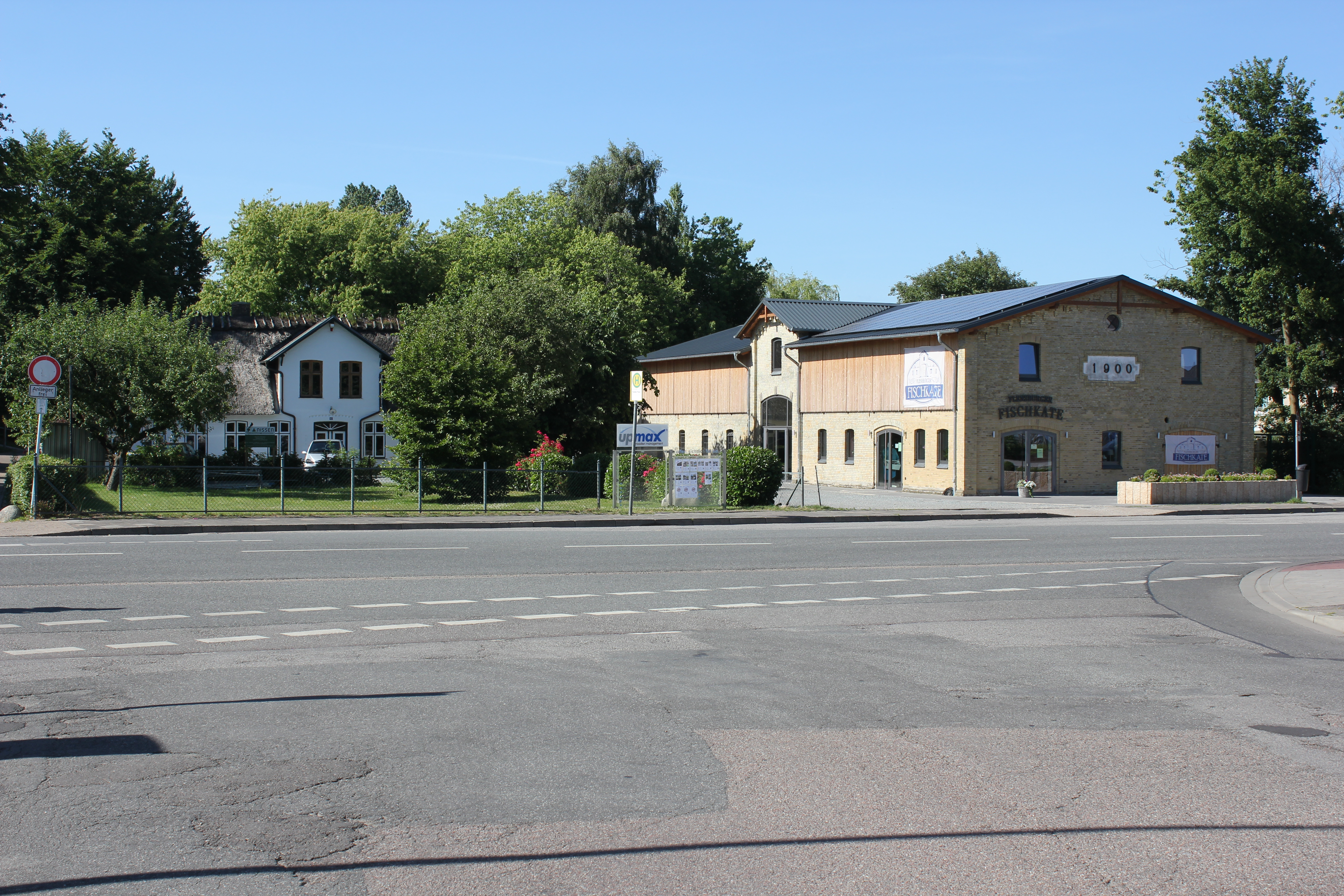 Fördestraße 65, Hauptgebäude des Gehöfts mit Fischkate (Flensburg Juni 2014)